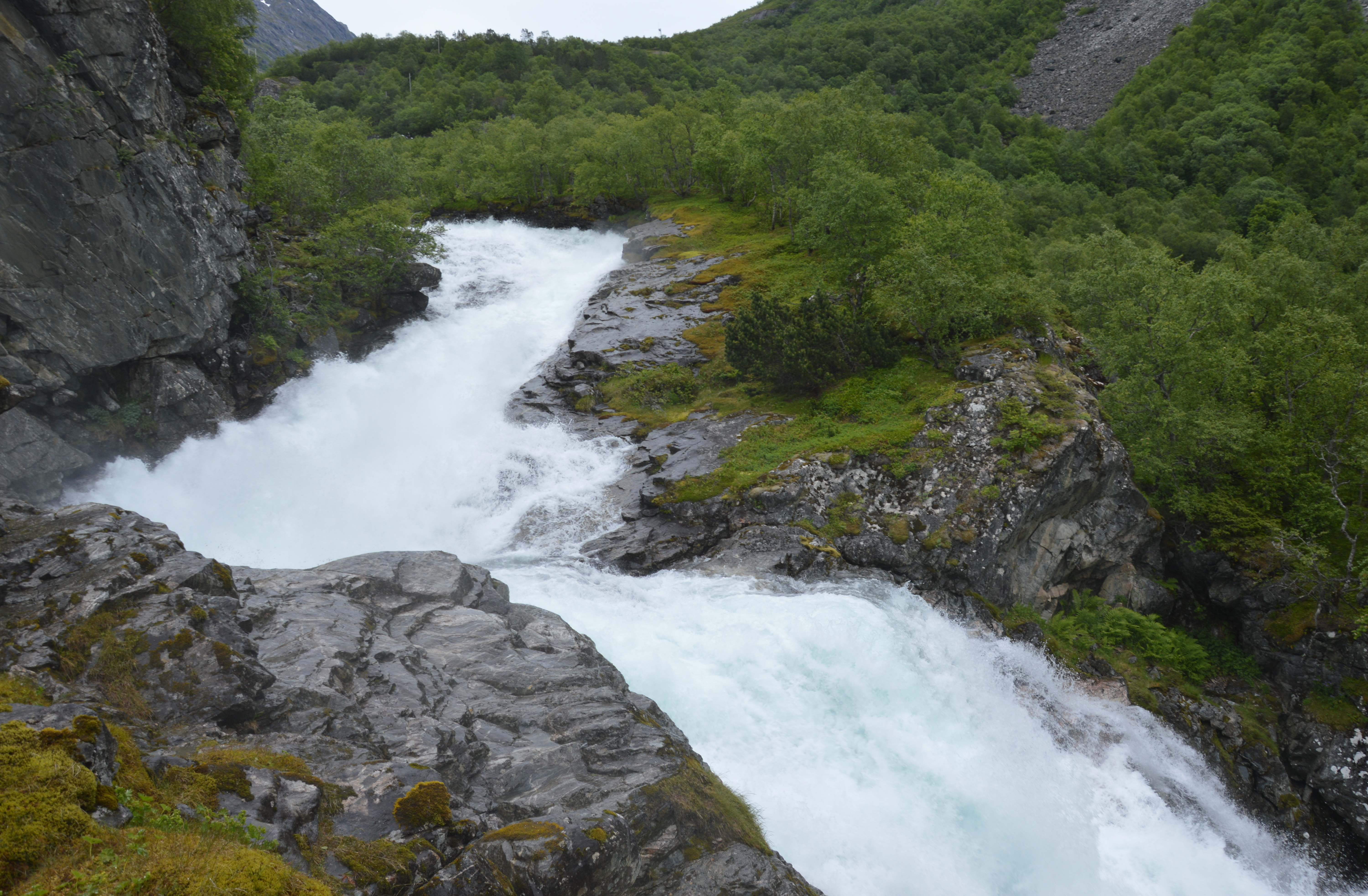 Øvstebrufossen